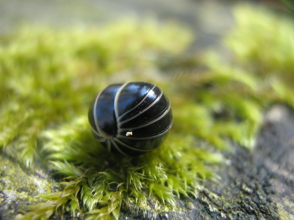 Der Saftkugler Glomeris marginata, gefunden im Billenhägener Forst (Landkreis Bad Doberan) in einem lichten Rotbuchenbestand in der Bodenstreu an einem Buchenstubben. 54°7′14″N 12°22′7″E / 54.12056°N 12.36861°E